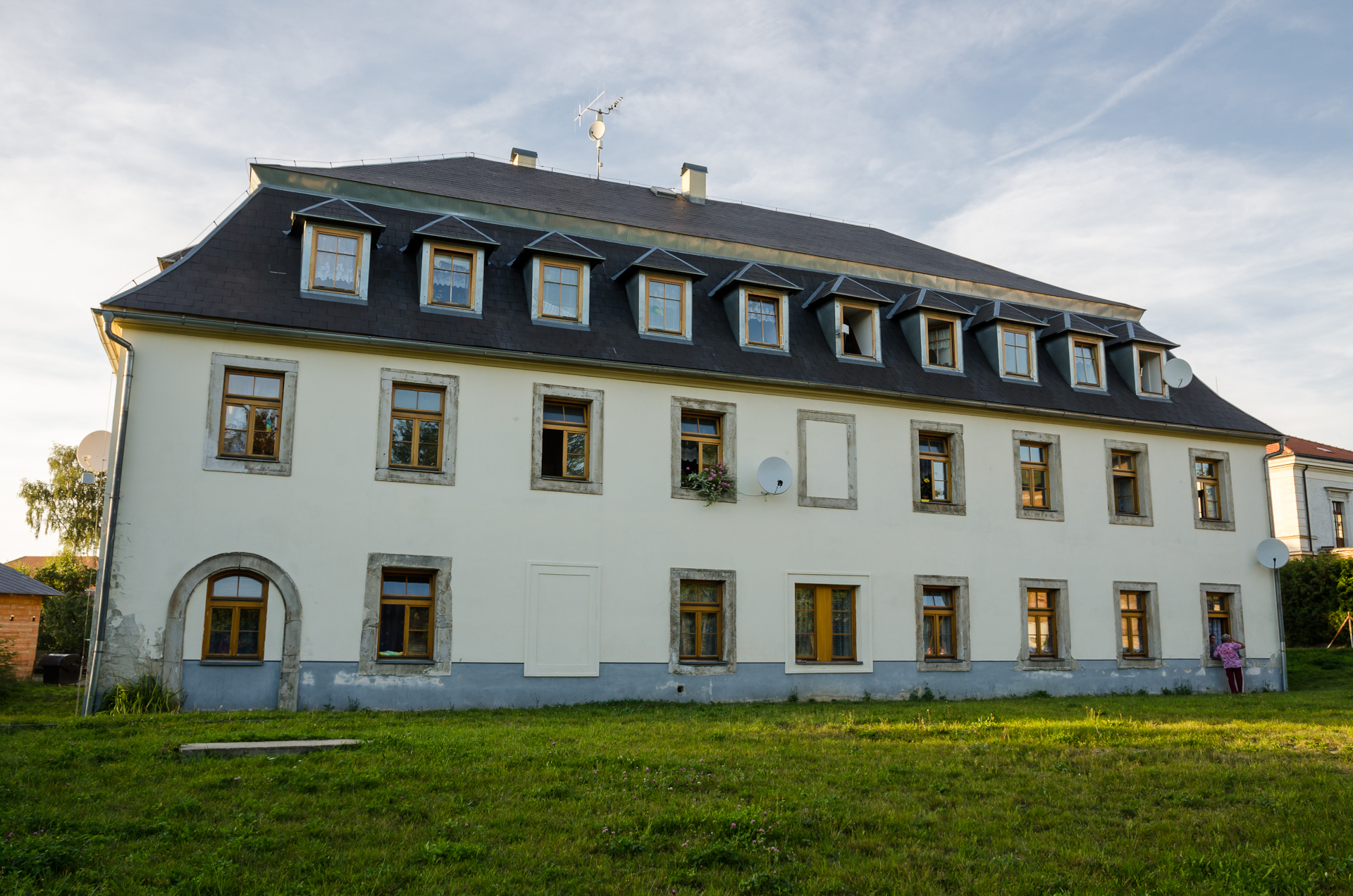 Textilní továrna - využití jako obytný dům (Hrádek nad Nisou), Hrádek nad Nisou 67